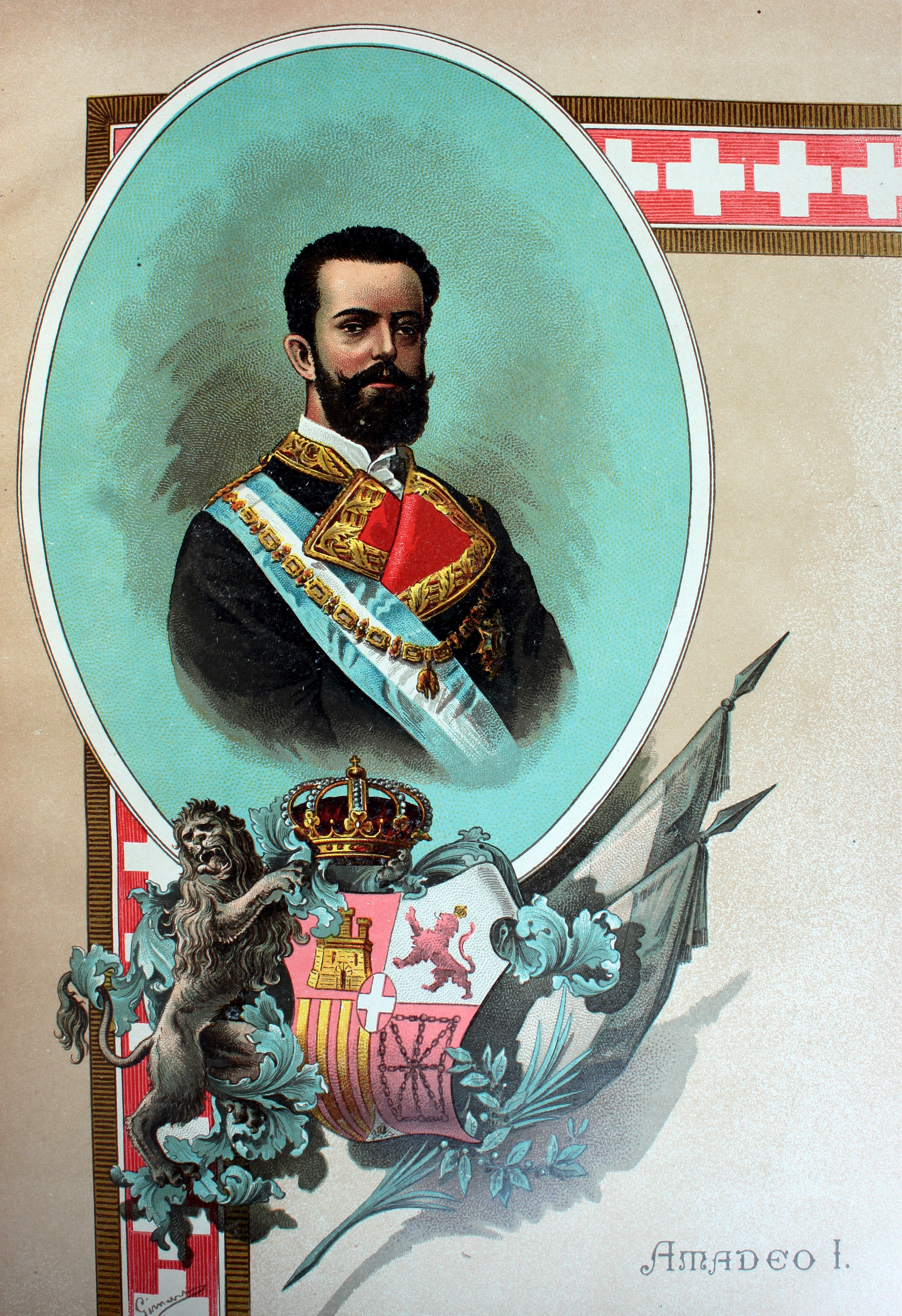 "Amadeo I". Ilustraciones de la obra : Historia contemporánea. Segunda parte de la Guerra Civil : anales desde 1843 hasta el fallecimiento de don Alfonso XII / por Antonio Pirala. - Madrid : Felipe González Rojas, 1893-1895